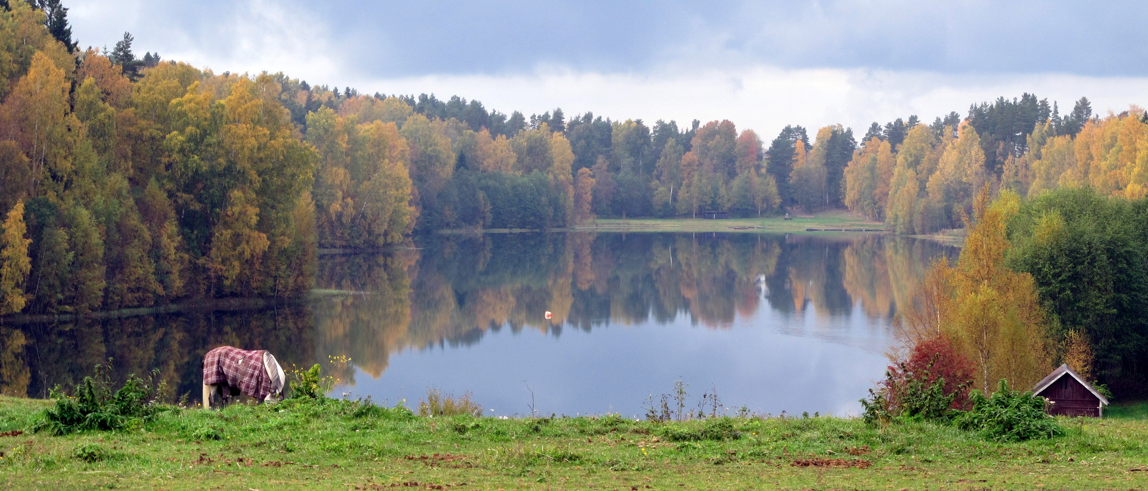 Långsjön (Stora Tuna socken, Dalarna, 669953-148392)